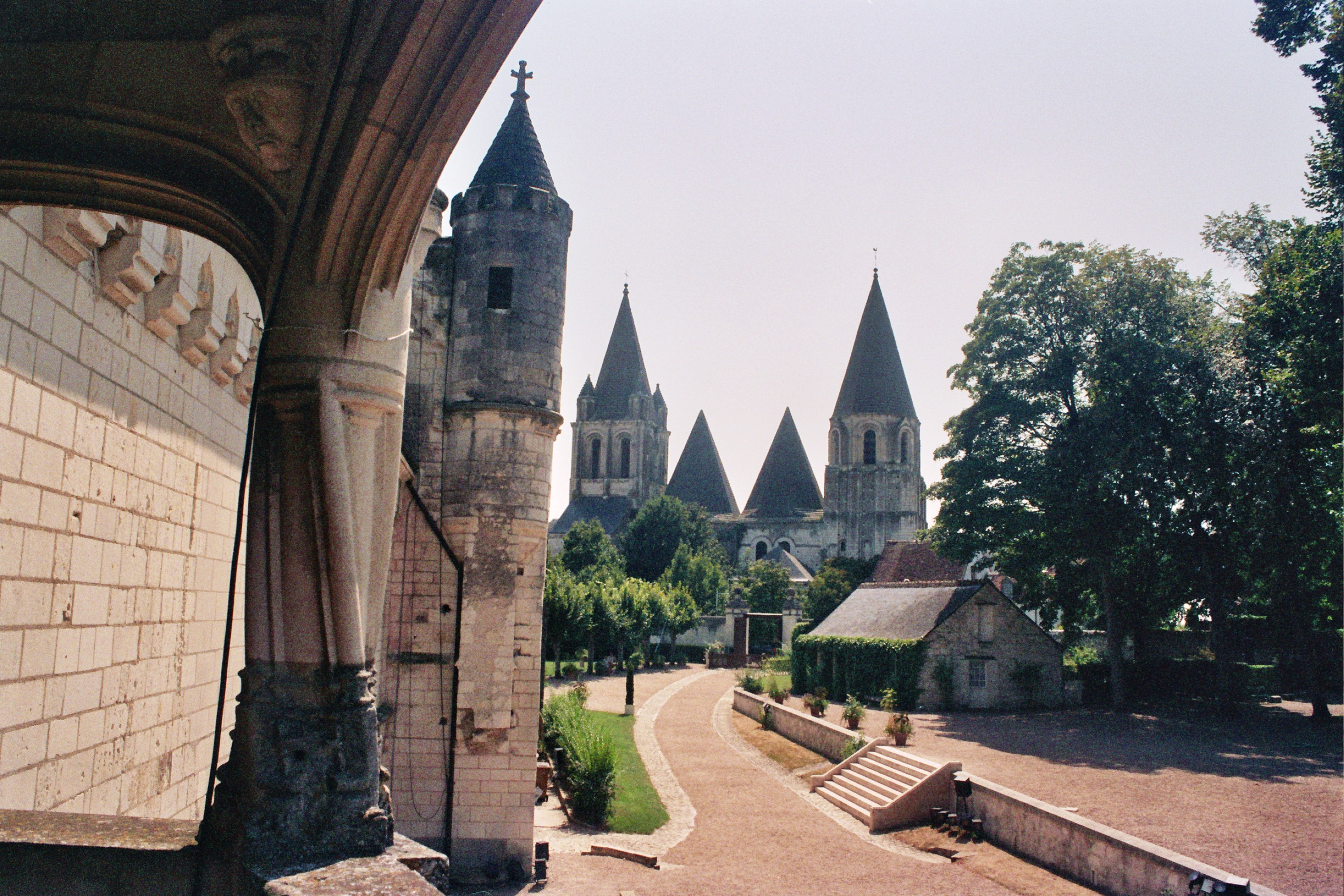 Château de Loches (ClasséClasséClasséInscrit) .